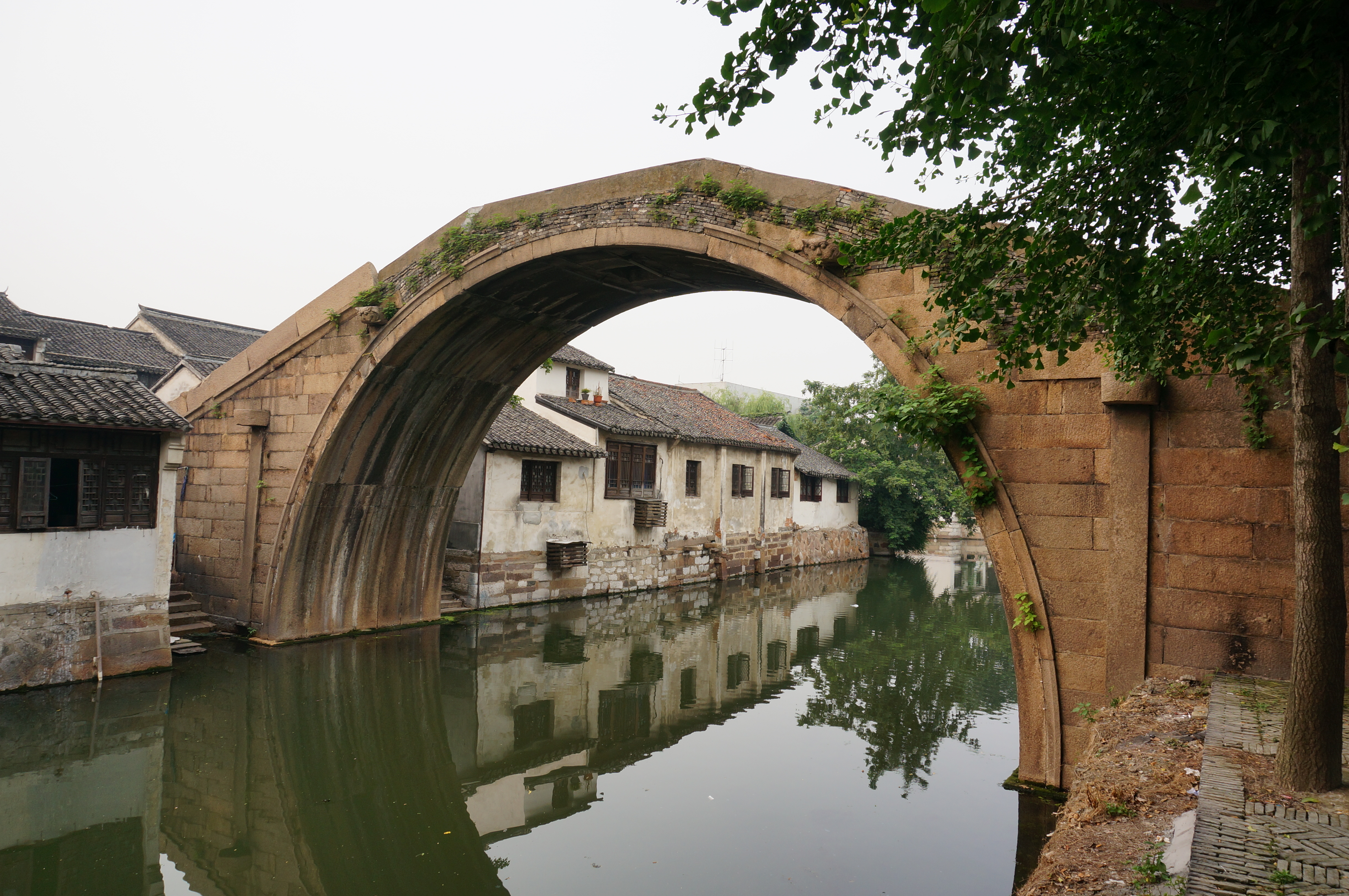 南浔洪济桥，南侧。